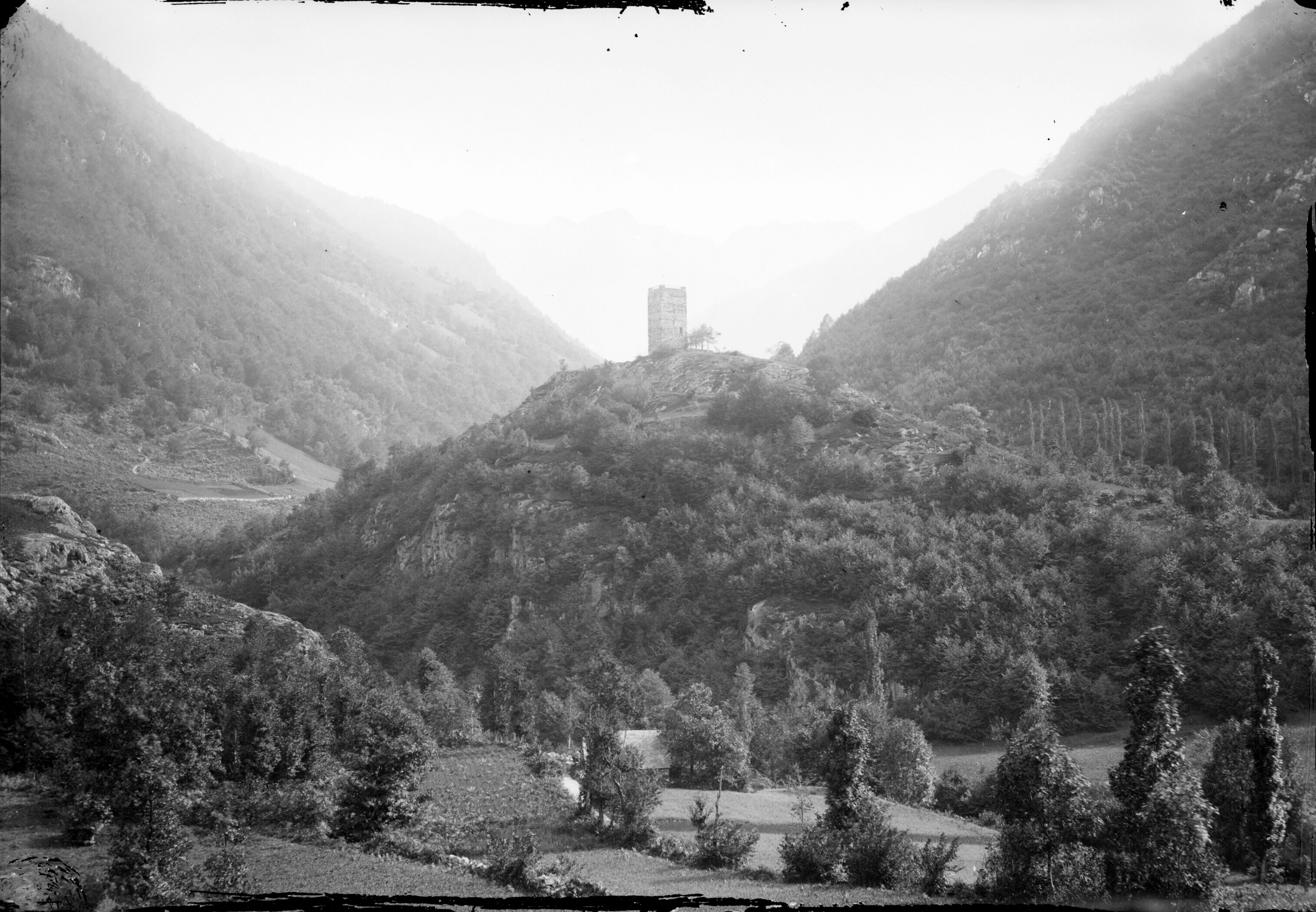 Fonds Trutat - Photographie ancienne Cote : TRU B 100 Localisation : Fonds ancien (S 30) Original non communicable Titre : Castel-Vieil, Luchon (environs) Auteur : Trutat, Eugène Rôle de l’auteur : Photographe Lieu de création : Castel-Vielh (Haute-Garonne) Date de création : 1859-1910 [entre] Mesures : : 13 x 18 cm Mot(s)-clé(s) : -- Vallée -- Verrou glaciaire -- Montagne -- Arbre -- Végétation -- Tour fortifiée -- Maison -- Jardin -- Champ -- Bagnères-de-Luchon (Haute-Garonne ; canton) -- Castel-Vielh (Haute-Garonne) -- Pique (France ; vallée) -- Luchonnais, Massif du (France) -- 19e siècle, 2e moitié -- 20e siècle, 1e quart Médium : Photographies -- Négatifs sur plaque de verre -- Noir et blanc -- Paysages Bibliographie : Frappé (Jean-Bernard). - Autrefois Bagnères de Luchon. Tome II. - Anglet : Atlantica, 2001. - 297 p. ; 15 x 22 cm. - (Autrefois) cf. p. 180-181 Bibliothèque de Toulouse. Domaine public